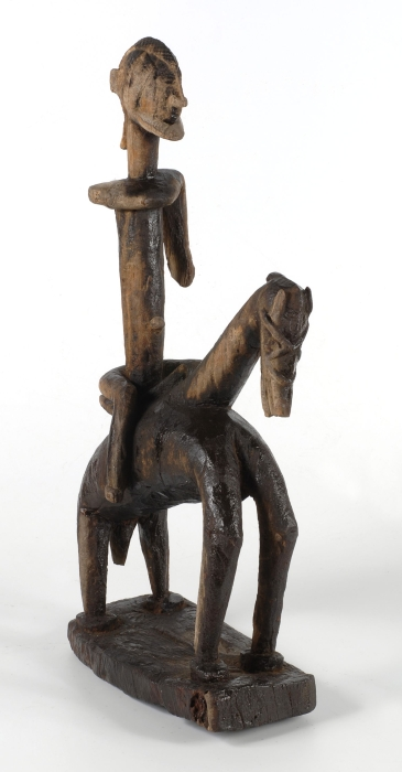 Het beeld wordt tezamen met andere figuren bewaard in een speciaal heiligdom dat beheert wordt door een Hogon (opperpriester) die ook zorg draagt voor de offers. Volgens Zwernemann (1973: 67) symboliseert de ruiter (hier een hermafrodiet) wellicht Amma, want in de voorouder-heiligdommen van Binu werden dergelijke ruiterfiguren uit hout of ijzer aangetroffen. Het paard is een symbool van de watergod Nommo. Ruiterfiguren zijn een bekend thema in Dogon kunst. De paarden worden doorgaans simpeler afgebeeld dan hun berijders. Paarden worden door heel West-Afrika over het algemeen geassocieerd met welvaart en macht. Door hun zeldzaamheid en kostbaarheid, zijn ze meestal eigendom van leiderfiguren. Een van hen is de hogon, de priester van de 'Lebe'-verering. 'Lebe' is een legendarische voorouder en godheid die verbonden is met agriculturele vruchtbaarheid en groei van gewassen. De 'hogon' is de machtigste figuur in de gemeenschap. Dogon ruiterfiguren worden dus vaak verondersteld 'hogon' te zijn. Daarnaast moet rekening gehouden worden met de associatie die Dogon maken met (binnentrekkende) krijgers en gezanten van vreemde leiders (Visona et al. 2000:133-137).